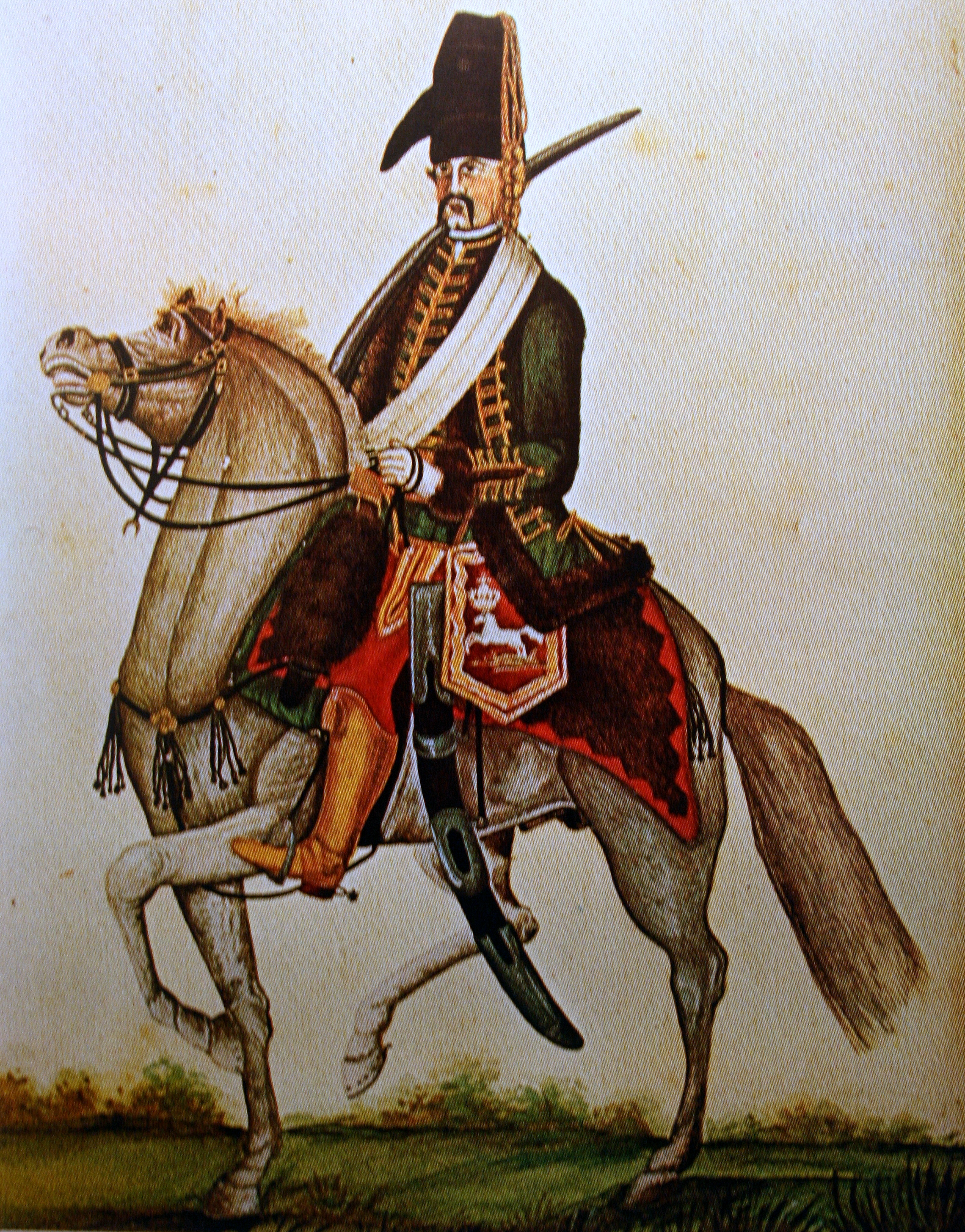 Lucknerscher Husar im Siebenjährigen Krieg.